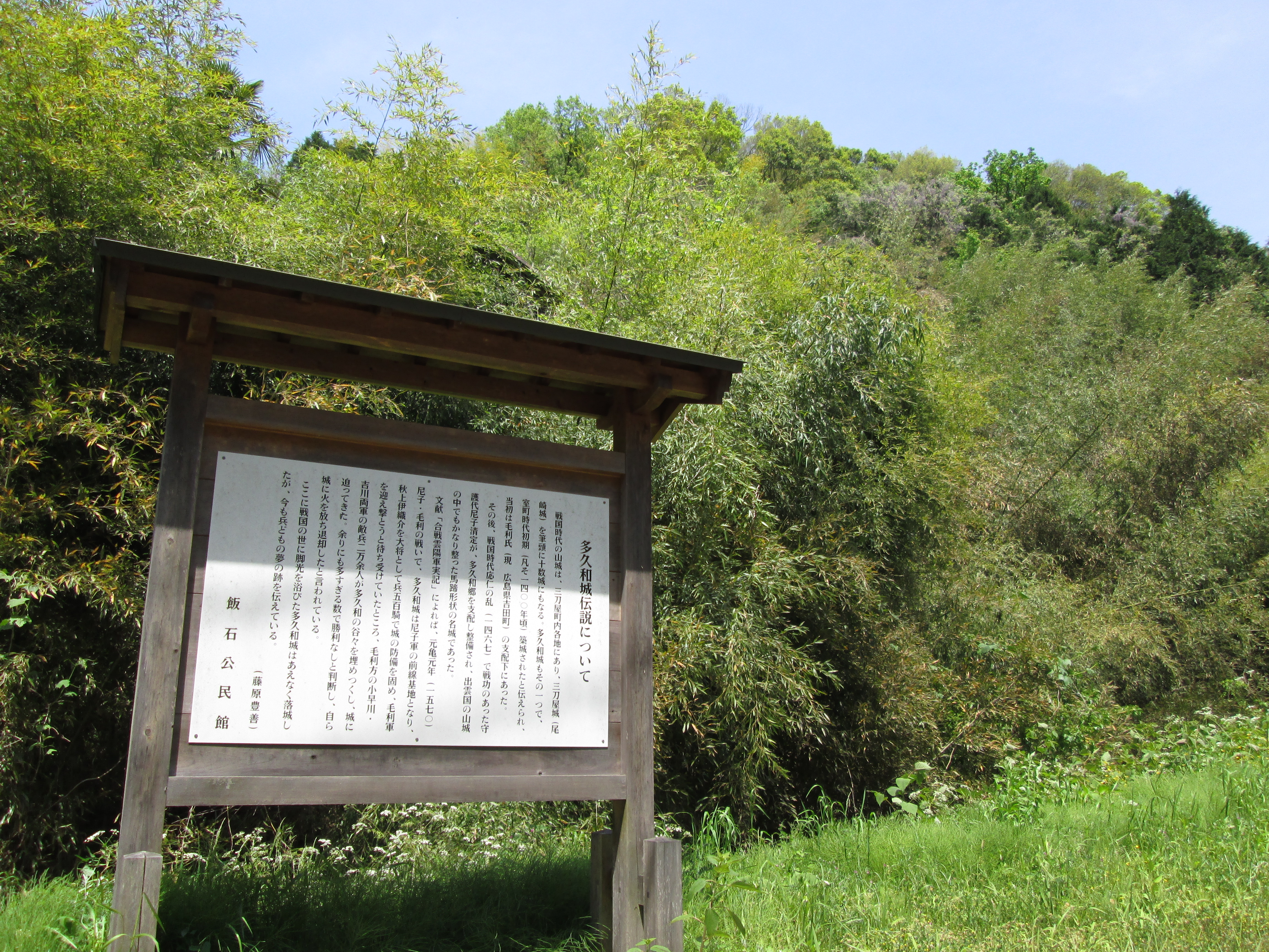 麓より望む多久和城。